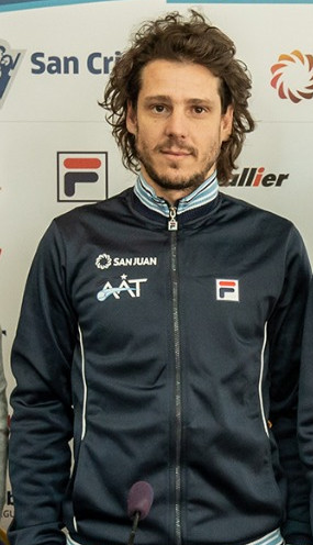 El presidente de la Asociación Argentina de Tenis, Agustín Calleri; el secretario de Deportes de la Nación, Javier Mac Allister y los capitanes del equipo de Copa Davis, Gastón Gaudio y Guillermo Coria, brindaron una conferencia de prensa en el CeNARD donde anunciaron la nómina que enfrentará a Colombia, del 14 al 16 de septiembre en San Juan.